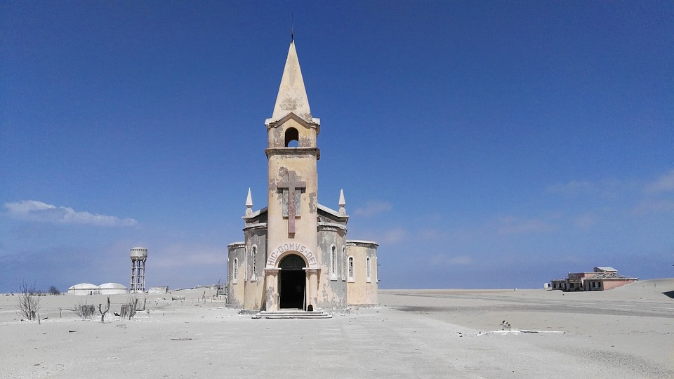 Kapelle auf der Tigerinsel (Capela da baia dos tigres), Blick von Norden, im Hintergrund der südliche Wasserurm